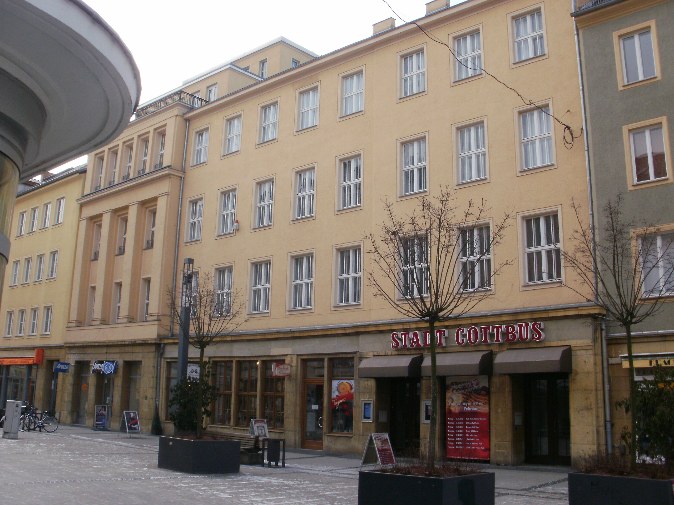 Wohn- und Bürohaus Spremberger Straße 29-31, Cottbus